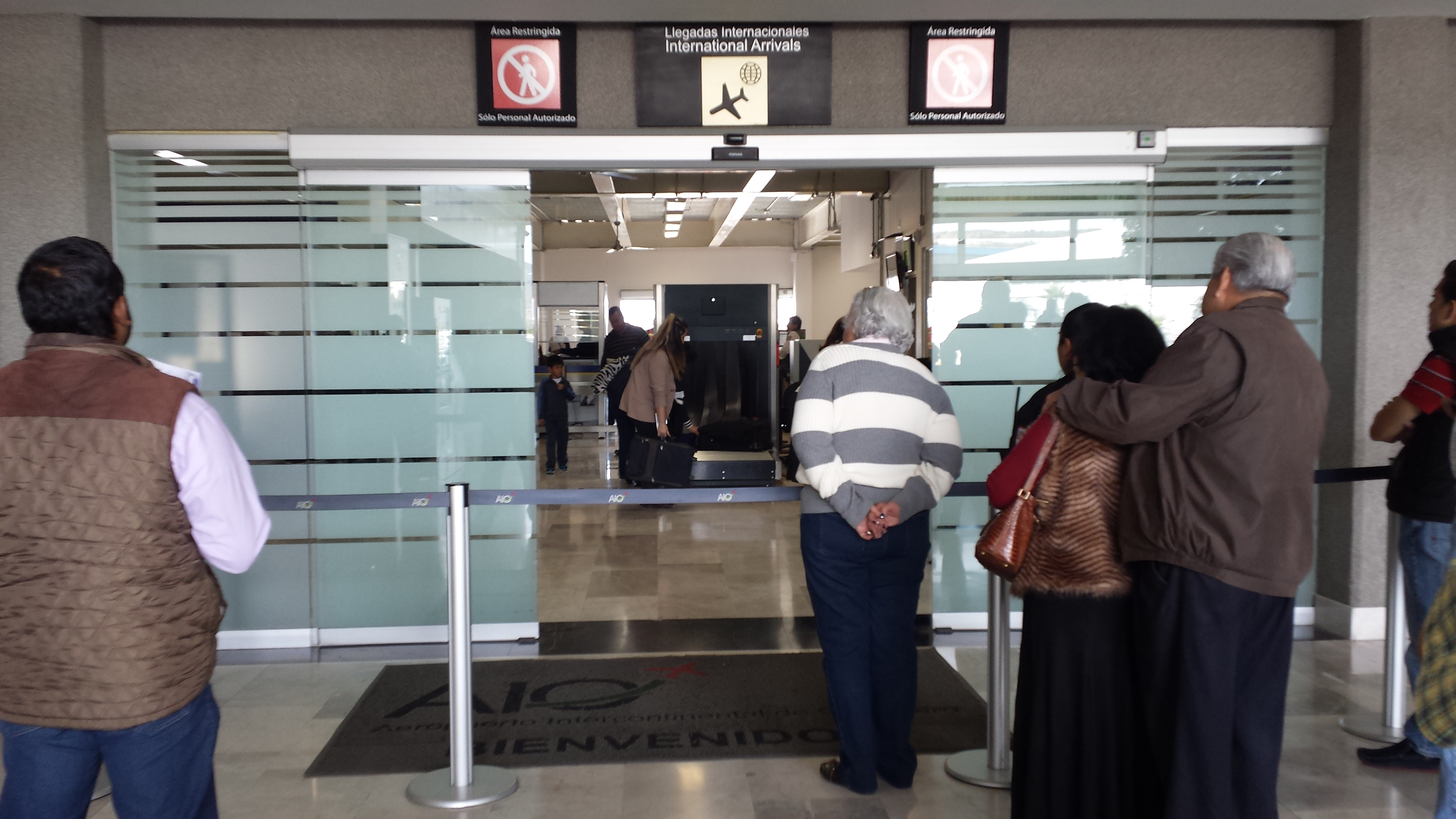 Fotografía de la Sala de llegadas de la Terminal de Pasajeros del Aeropuerto Intercontinental de Querétaro